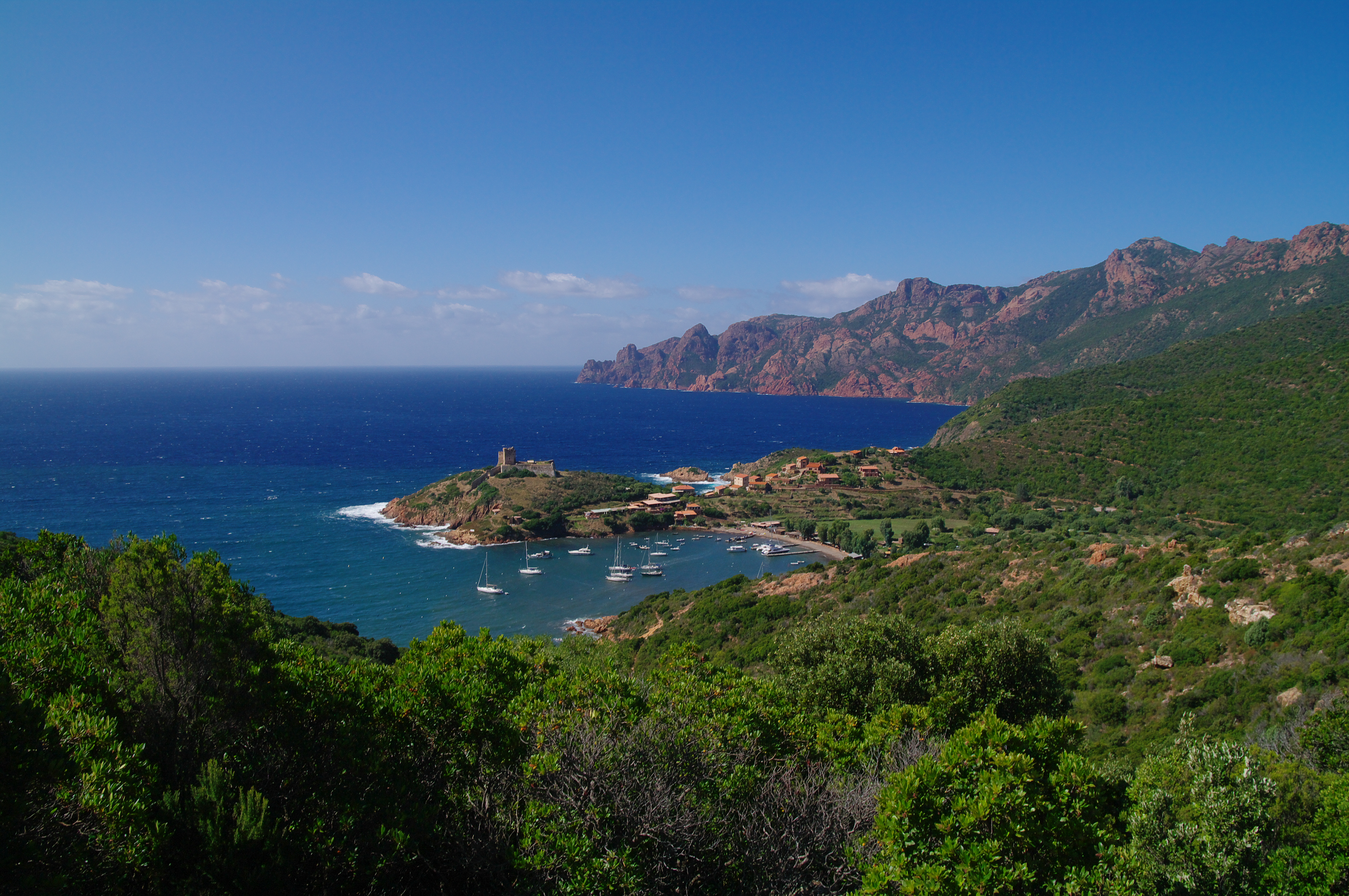 Girolata